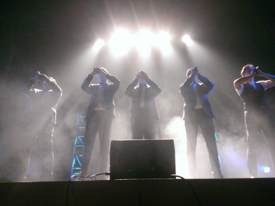 vijfde avondvullende show van Odiel van Caeyzeke